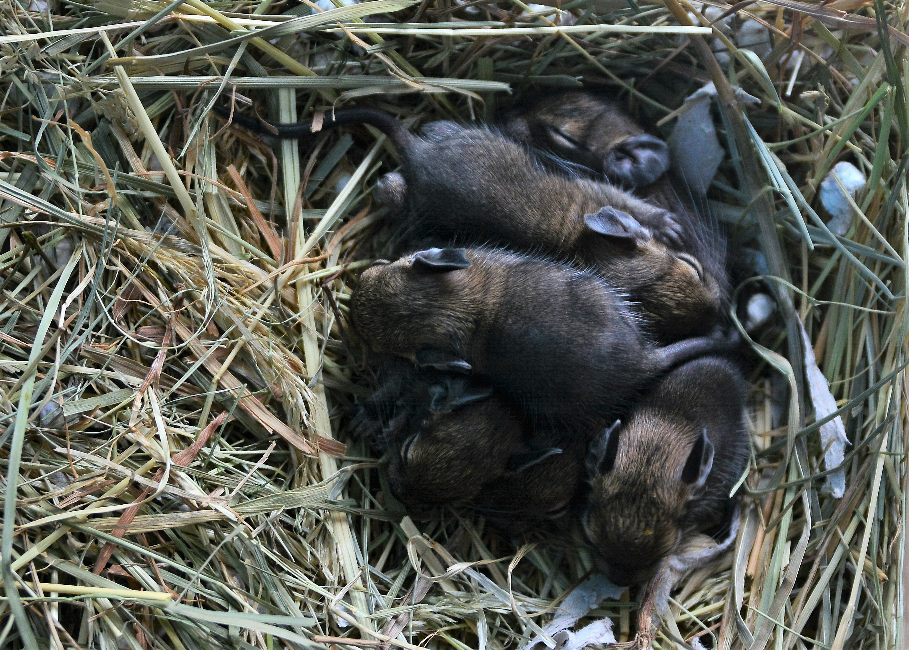 6 Osmáků degu, 3 dny starých